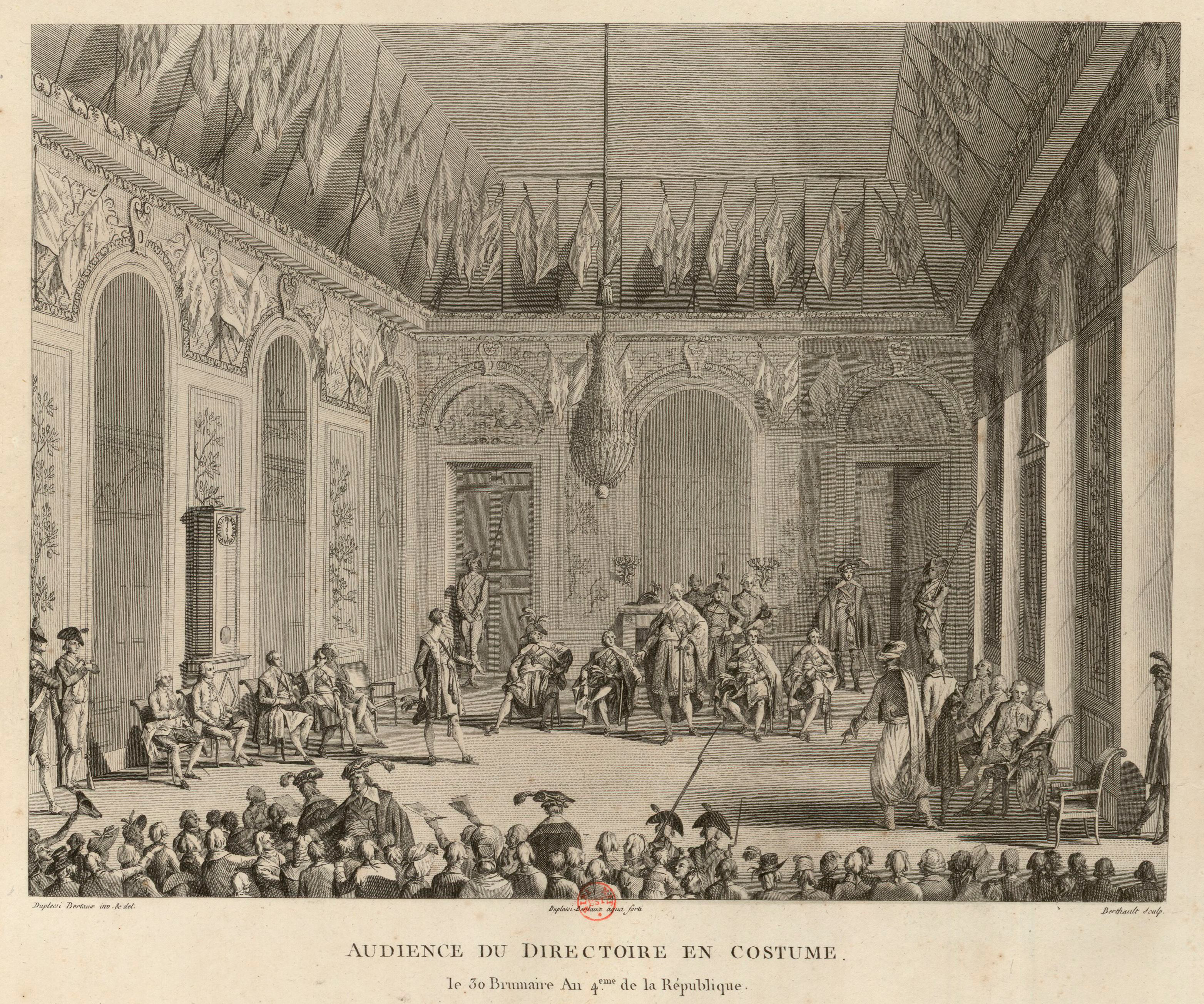 Audience du Directoire en costume : le 30 brumaire an 4.eme de la République.